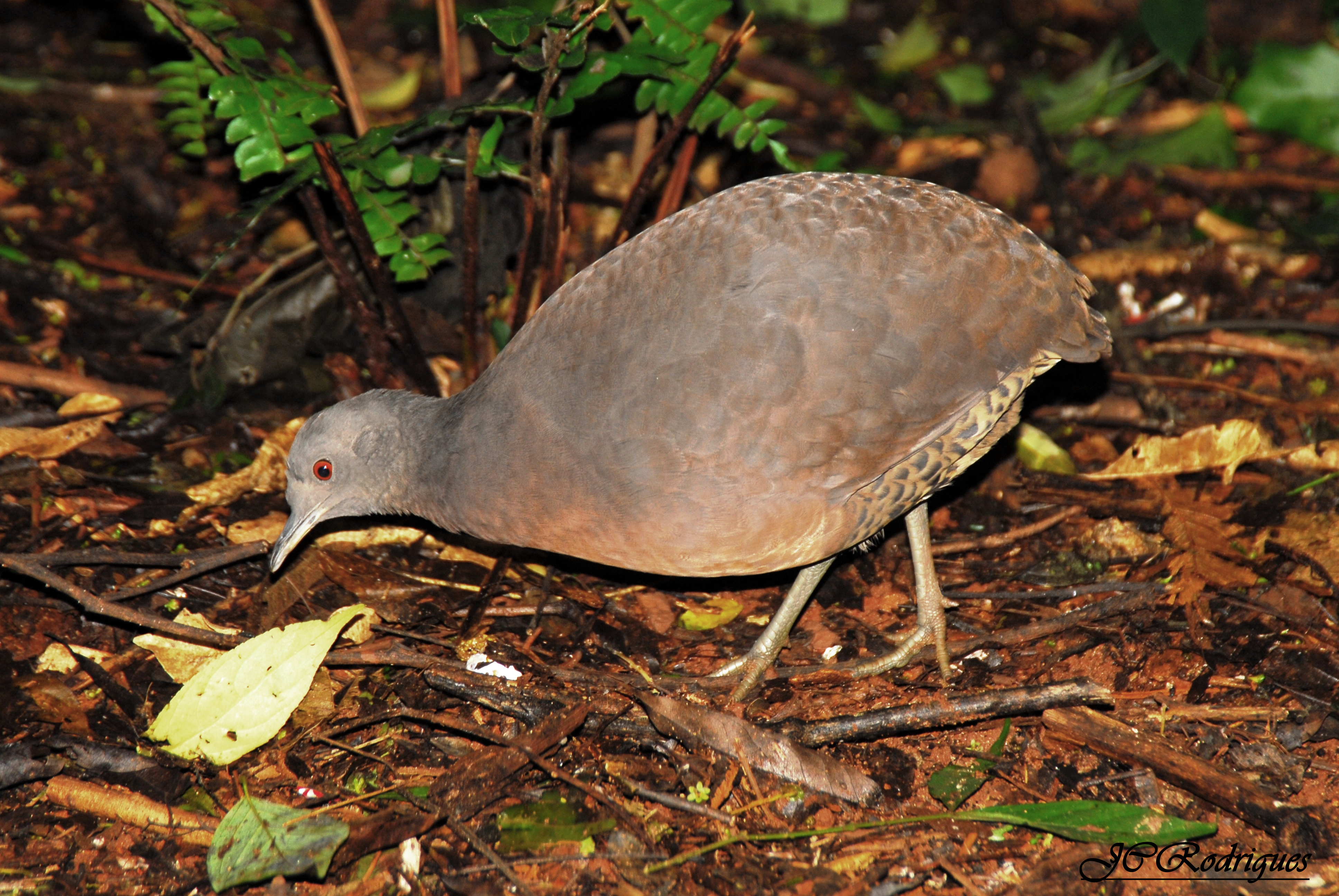 Inhambuguaçu - (Crypturellus obsoletus). Fotografei no município de São Roque - SP - Utilizando camuflagem e chamando com pio. Equipamento: Câmera.............. Nikon D200 Abertura............. F 5,3 Velocidade......... 1/60s Distância Focal... 78mm Flash sem retorno estroboscópico Data - 29/05/2008